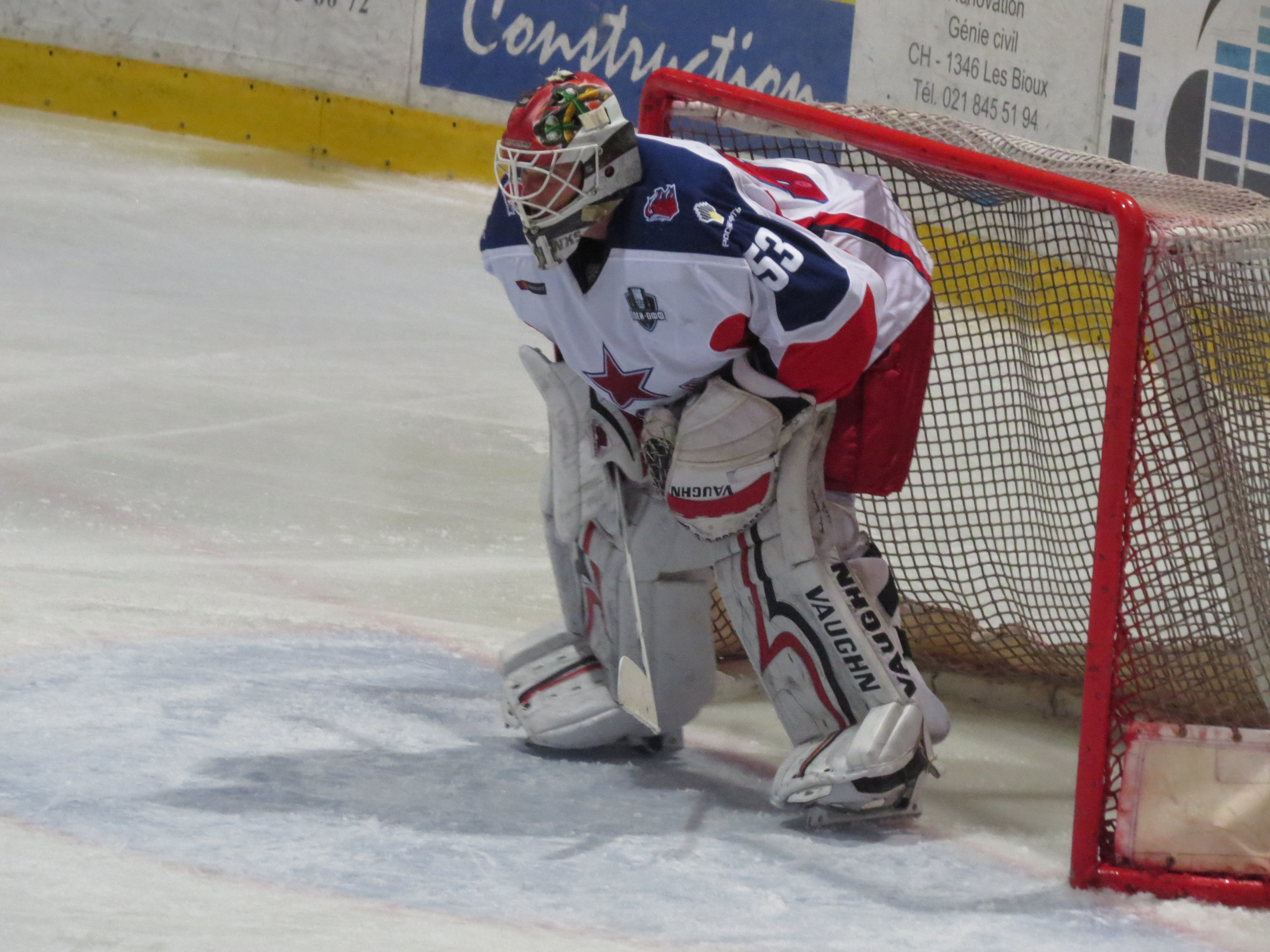 Match entre le CSKA Moscou et Lausanne le 8 août 2017 au Sentier (Hockeyades) 53 Johansson Lars